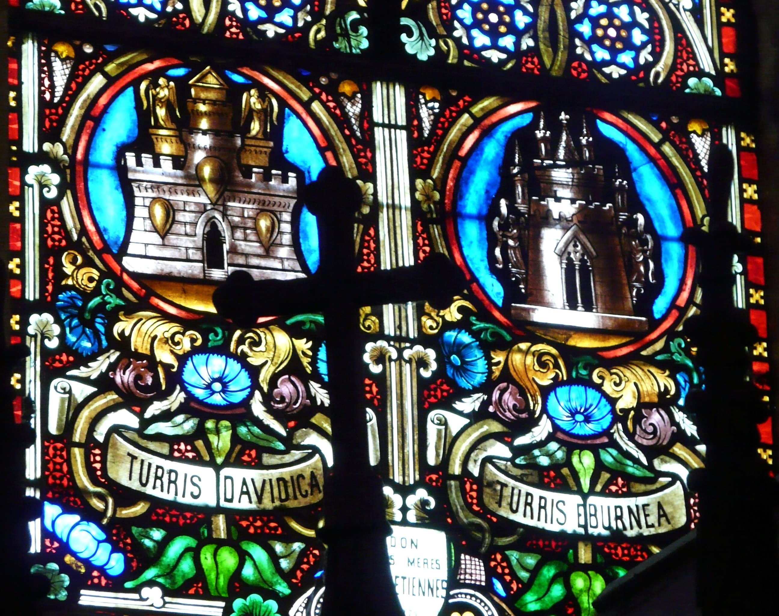 Détail d'un vitrail représentant la la tour de David et la tour d'ivoire, église Saint-Thomas, Excideuil, Dordogne, France.